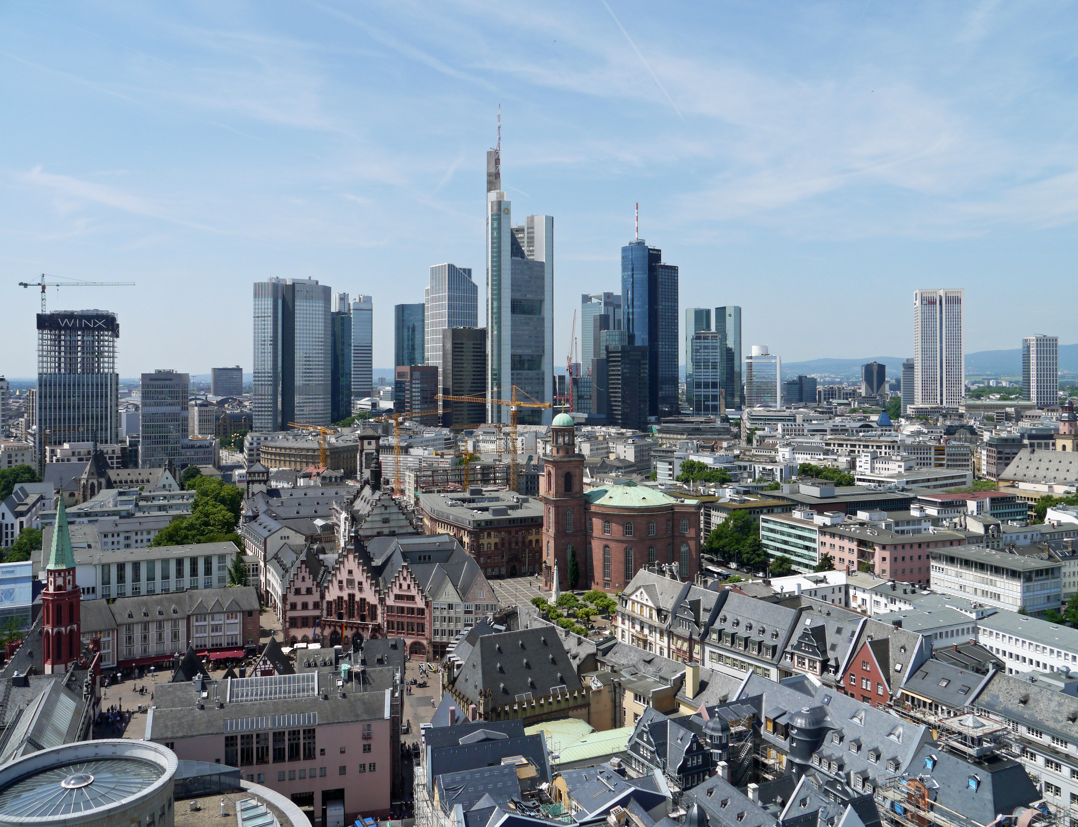 Blick im Juni 2017, vom Domturm über die Baustelle des Dom-Römer-Projektes auf die Frankfurter Skyline im Westen.